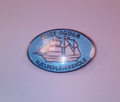 Skolens logo